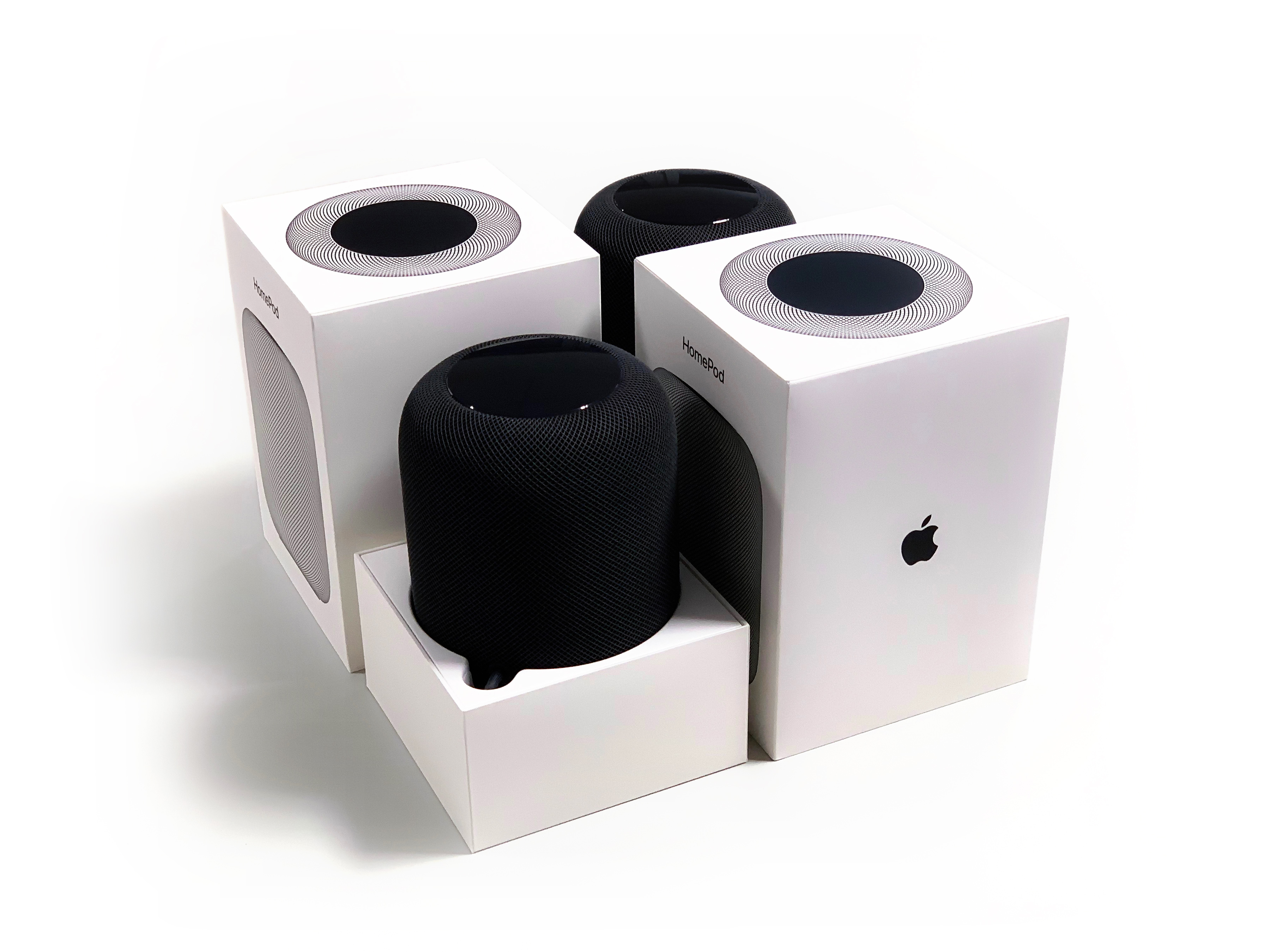 Apple HomePod - Smarte Lautsprecher der Firma Apple